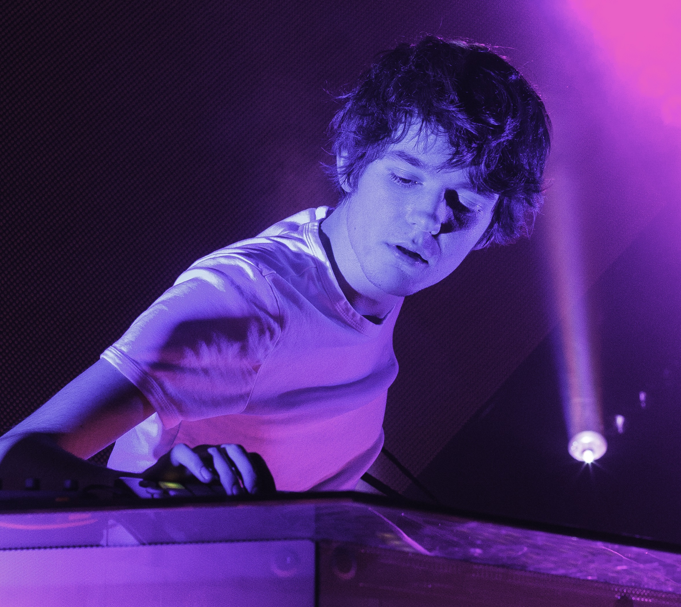 Madeon, Brussels Live, 04 april 2015